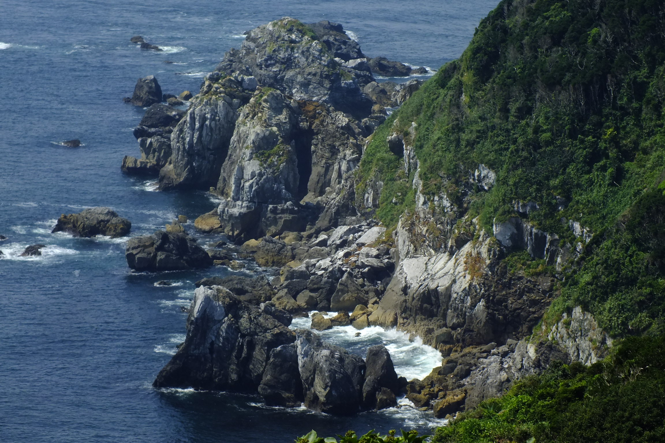 2016-08-05 Kami-shima Island,Benten-misaki from Kanteki-shô Ruins 神島監的哨跡から見る弁天岬